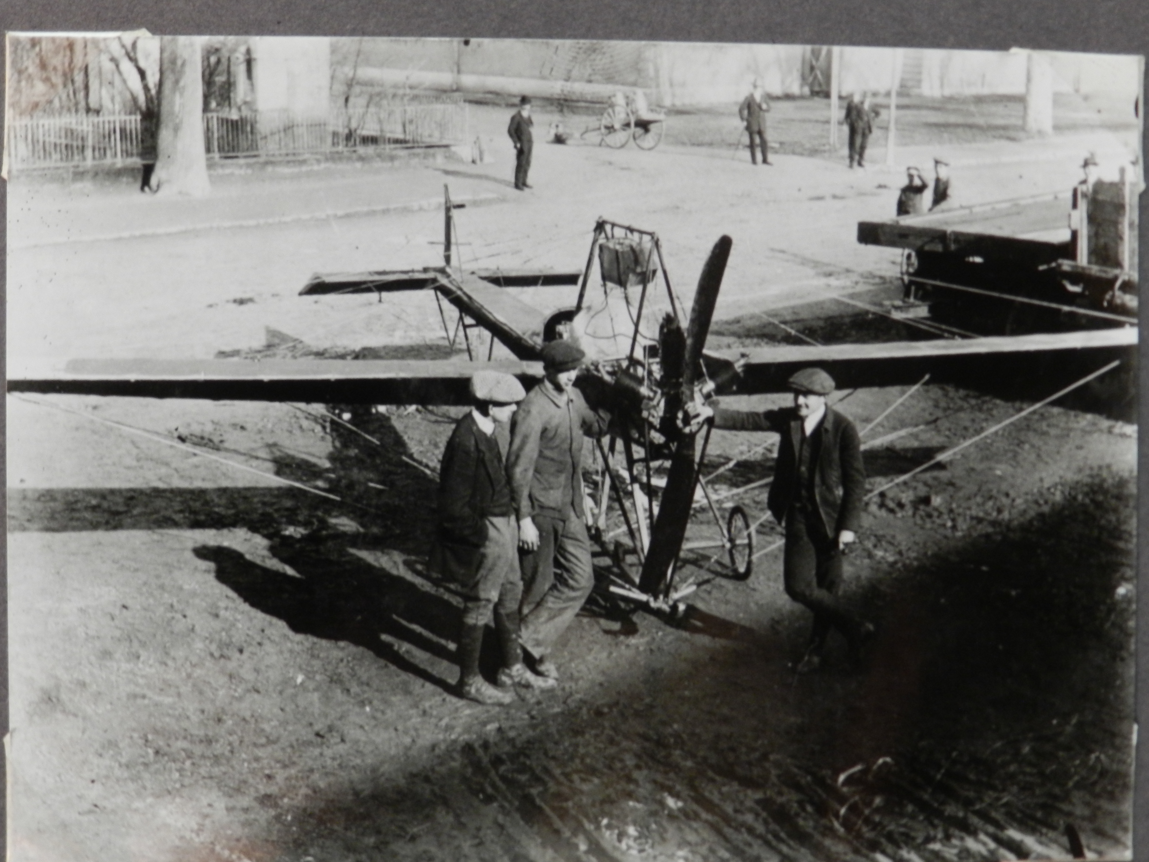 Dädalus 2, 1914 Bern (zweite Flugzeugkonstruktion von Adolf Schaedler)